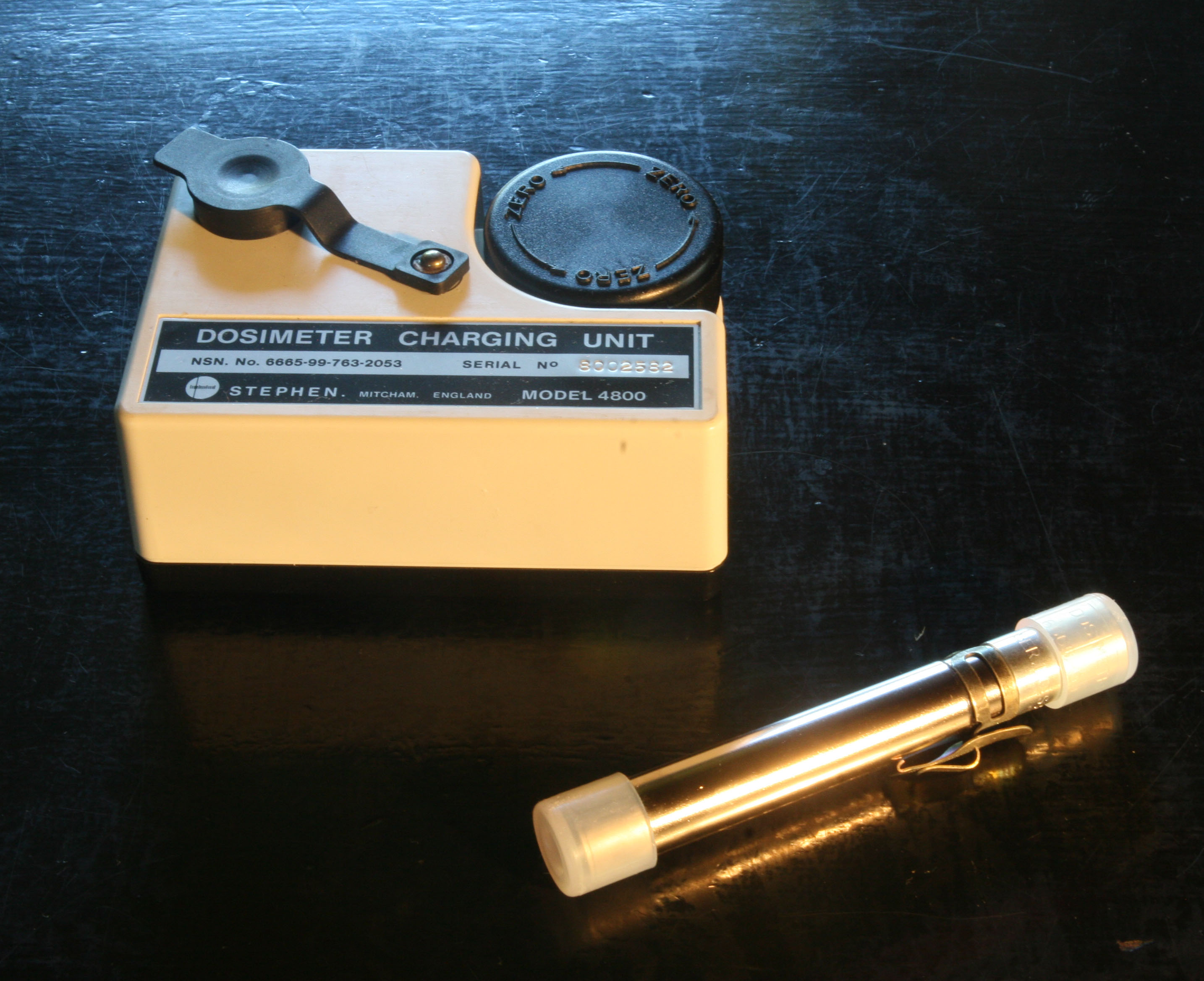 Dosimeter af elektroskoptypen med tilhørende oplader